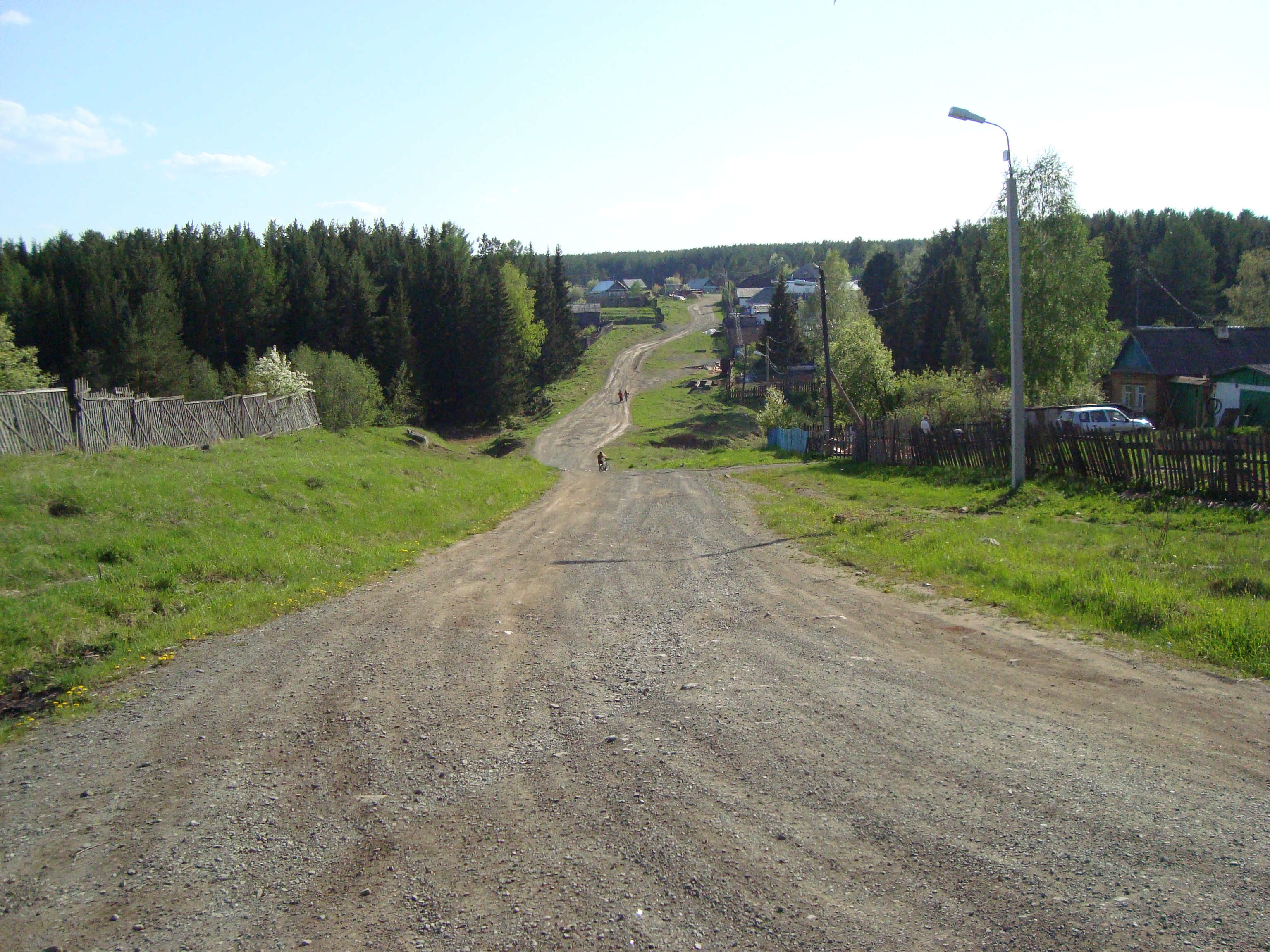 Дорога на Новостройку